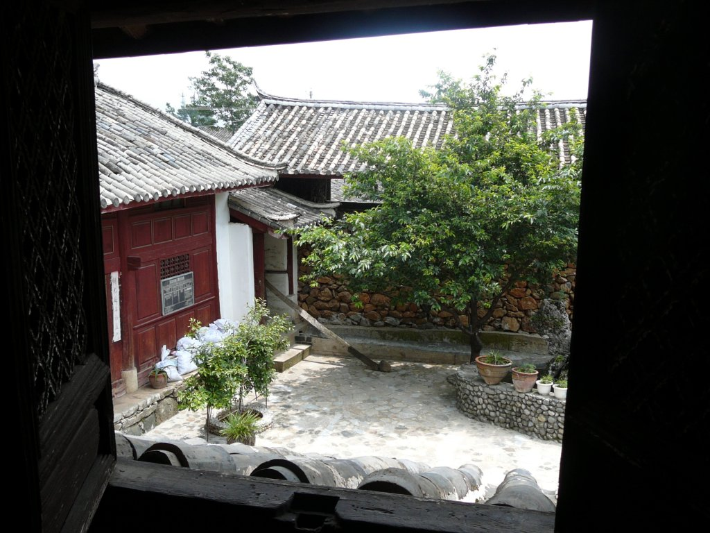 Wohnhaus von Dr. Joseph Rock in Baisha